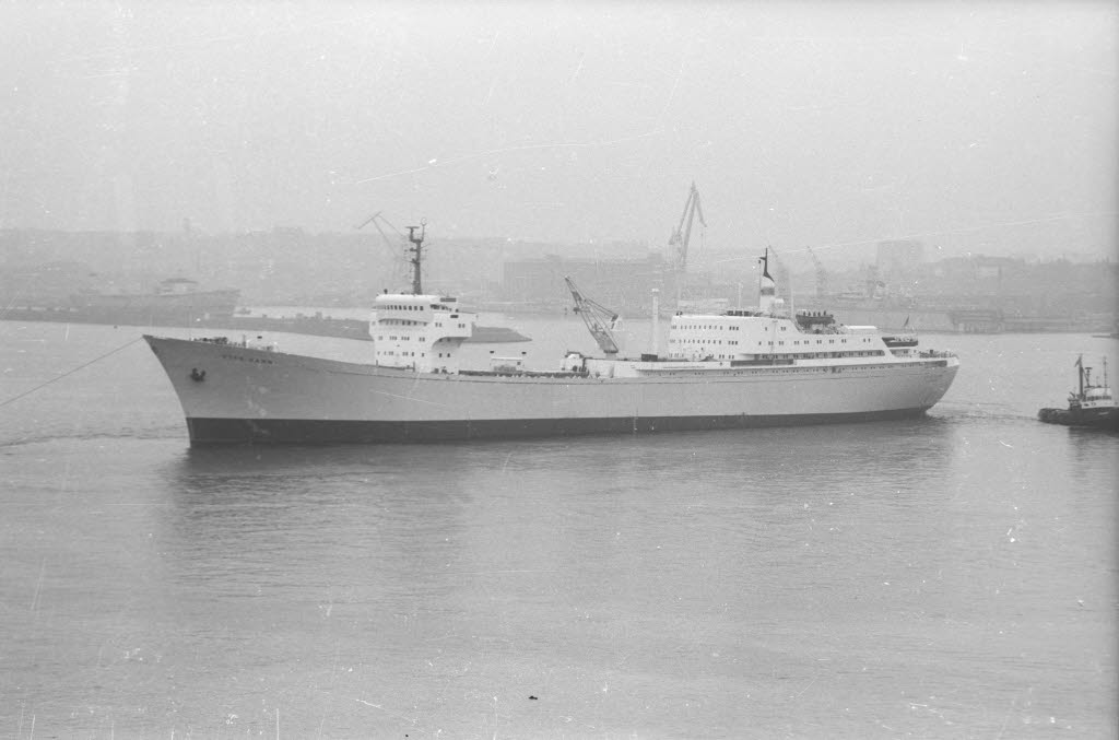 Erste Fahrt mit Kernenergie